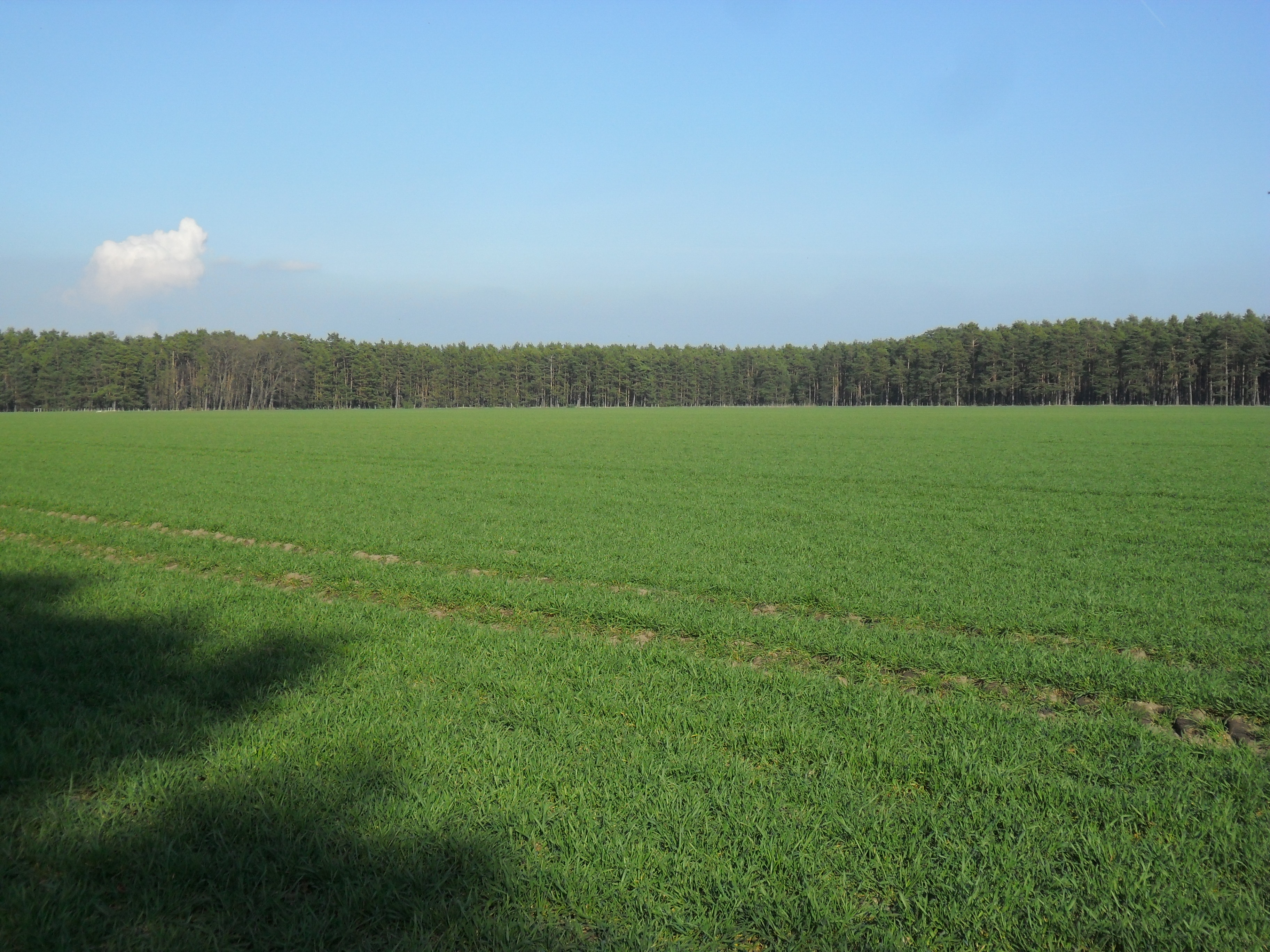 Driewitz-Milkeler Heiden bei Hermsdorf an der Spree Hornjoserbsce: Drěwčansko-Minakałska hola blisko Hermanec